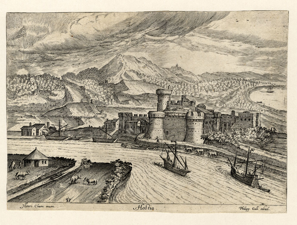 Cleve, Henrick III. van: Hostia; Kupferstich, um 1575